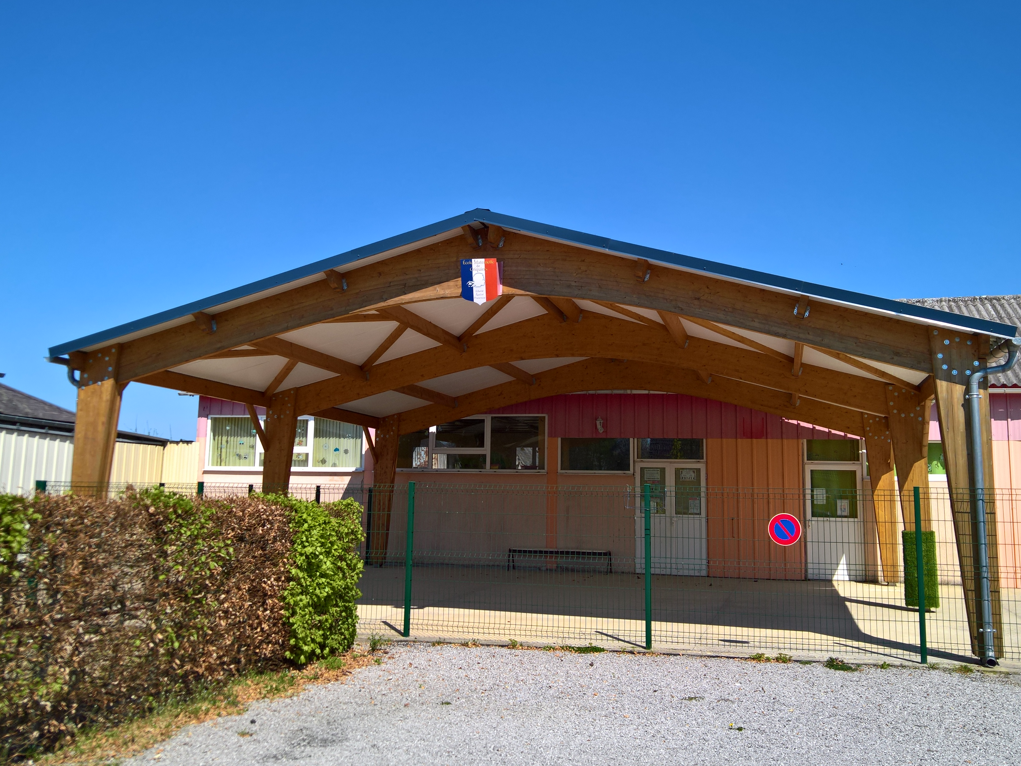 Ecole maternelle de Criquiers